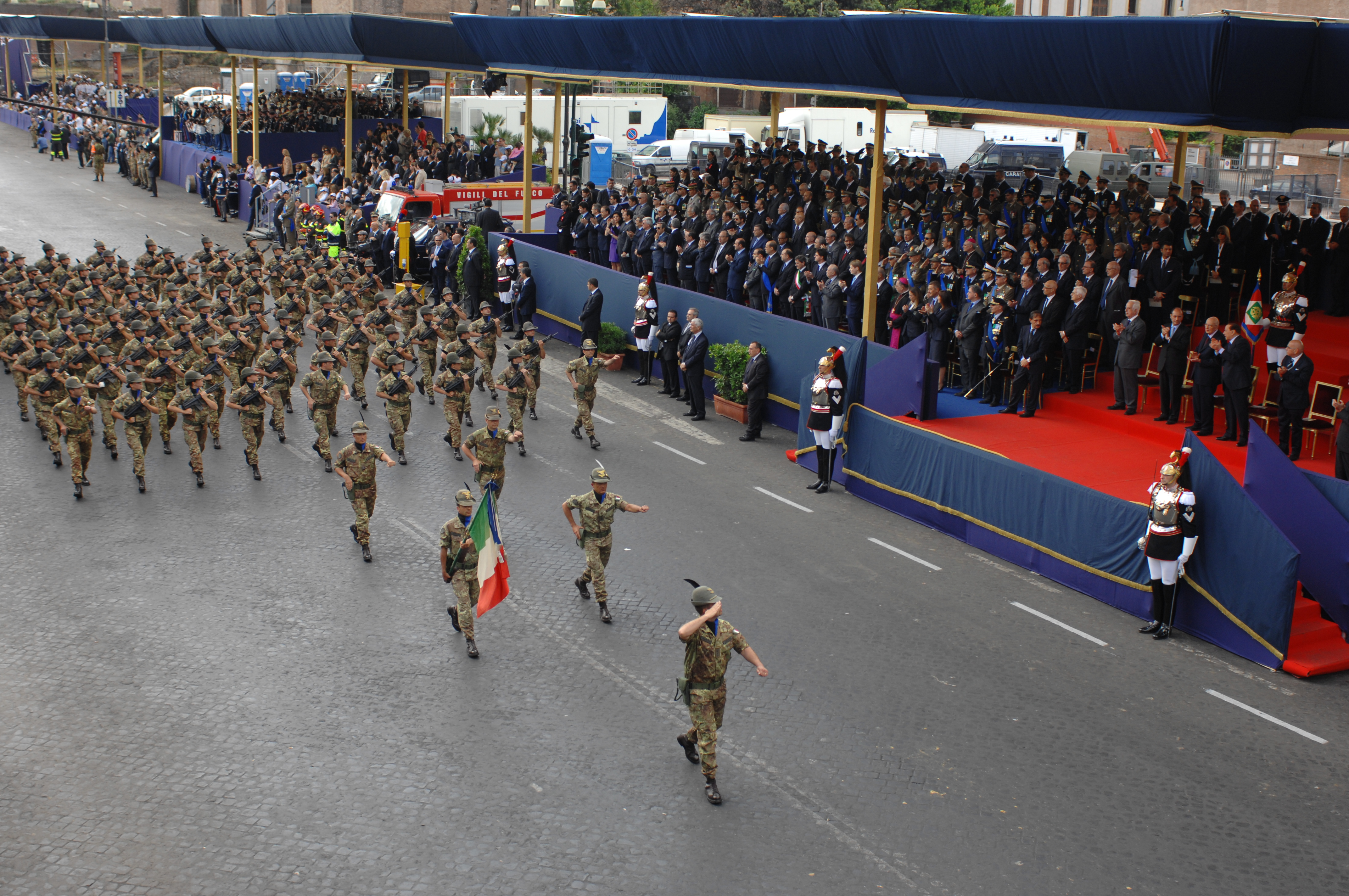 2 giugno 2010, il reggimento logistico Julie alla Festa della Repubblica